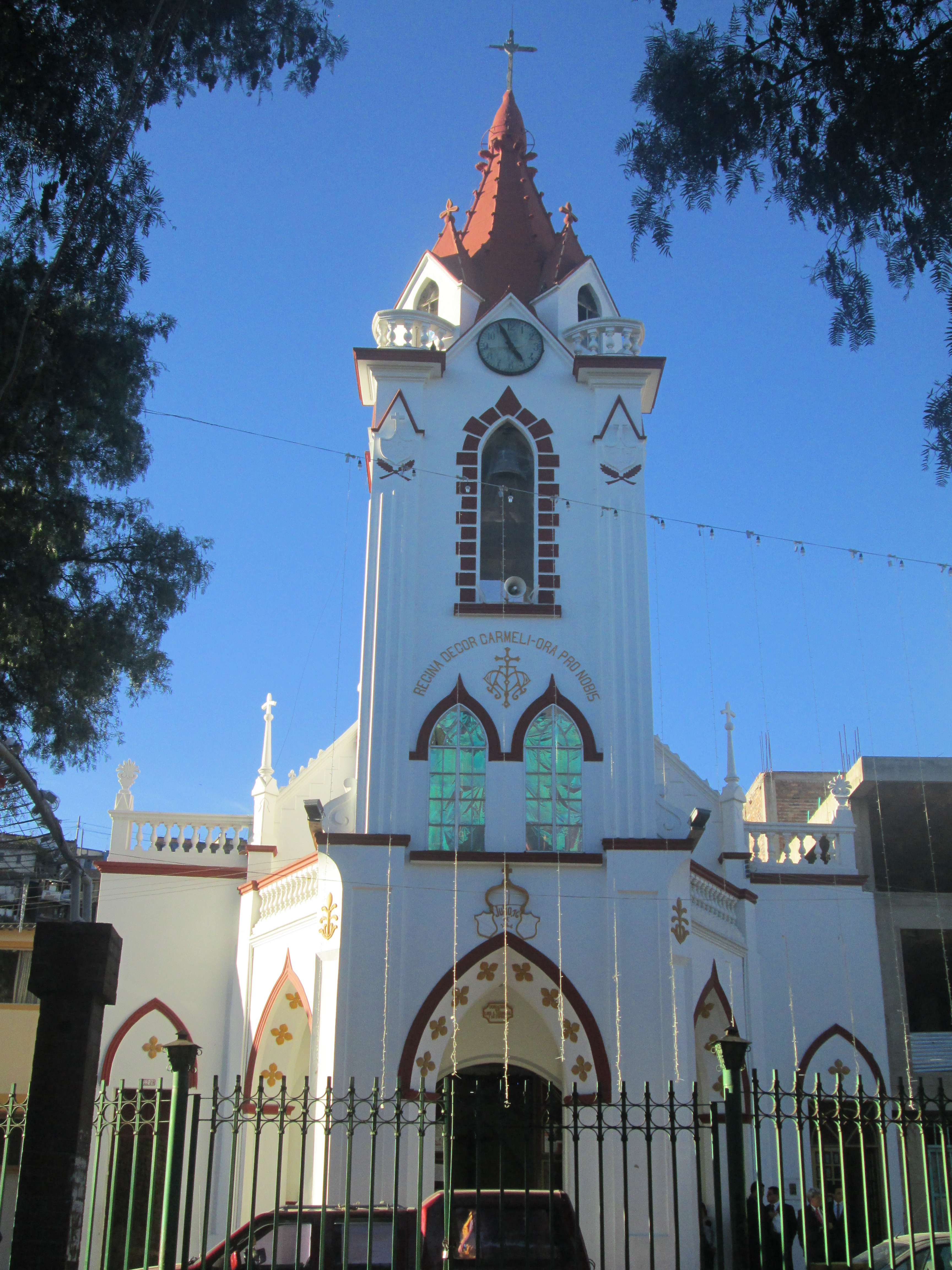 El Templo de Nuestra Señora del Carmen con su estilo gótico se rige en el costado norte del parque Luis A. Soler del carmen, la capilla construida el siglo pasado fue entregada a mediados de los cincuenta por la Junta pro Capilla a Monseñor José Joaquín Flórez Obispo de la Diócesis de Duitama. En el mes de Enero de 1971 fue constituida la Parroquia del Carmen. (Tomado de Guía Turística DUITAMA LA BELLA). Esta fotografía fue tomada en el municipio colombiano con código 15238.